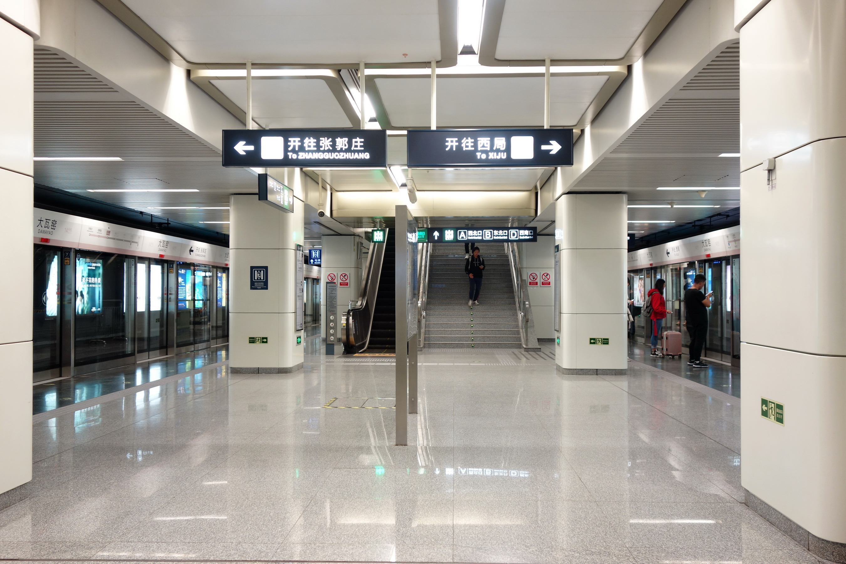 北京地铁14号线大瓦窑站岛式站台